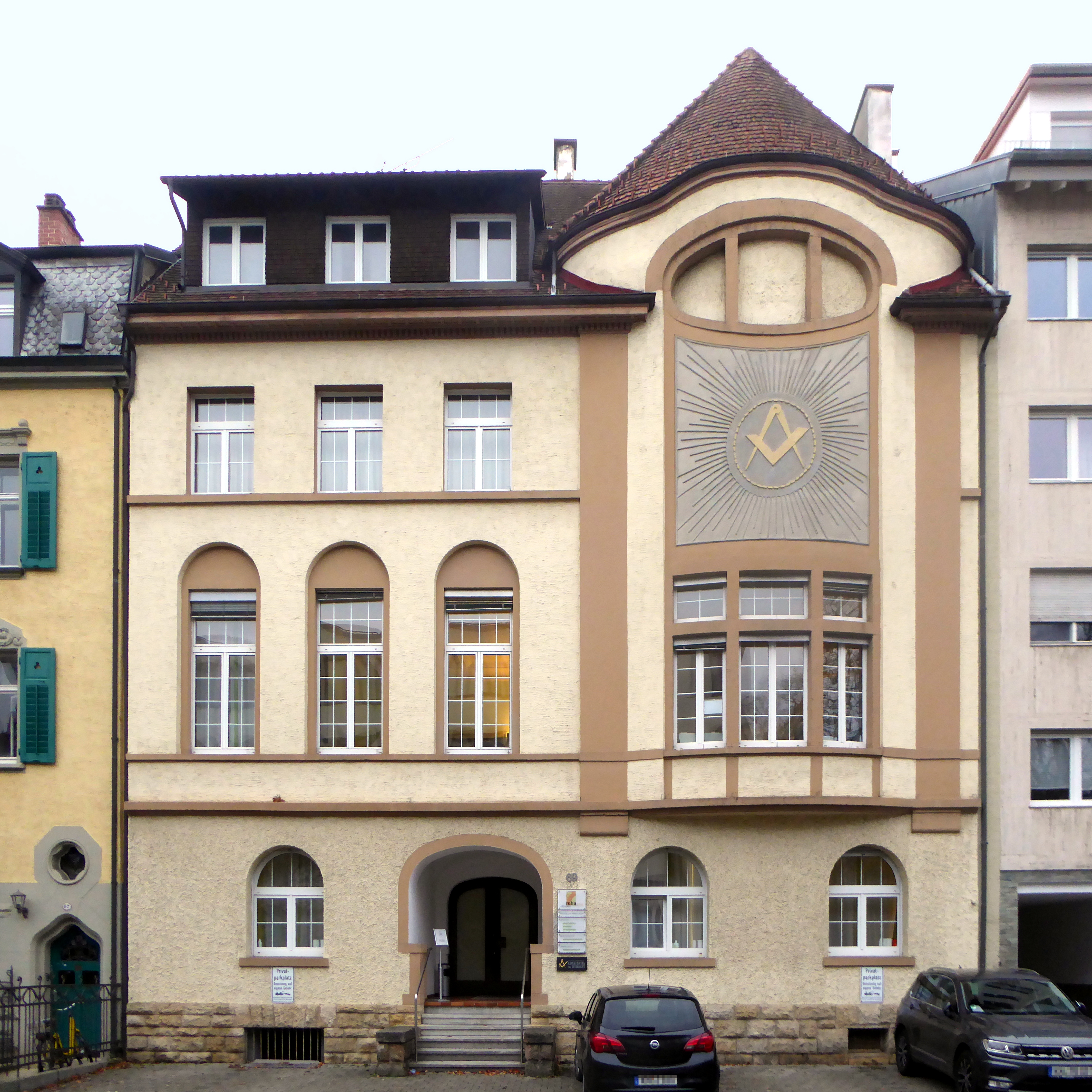 Konstanz, Schottenstraße 69, Haus der Freimaurer.